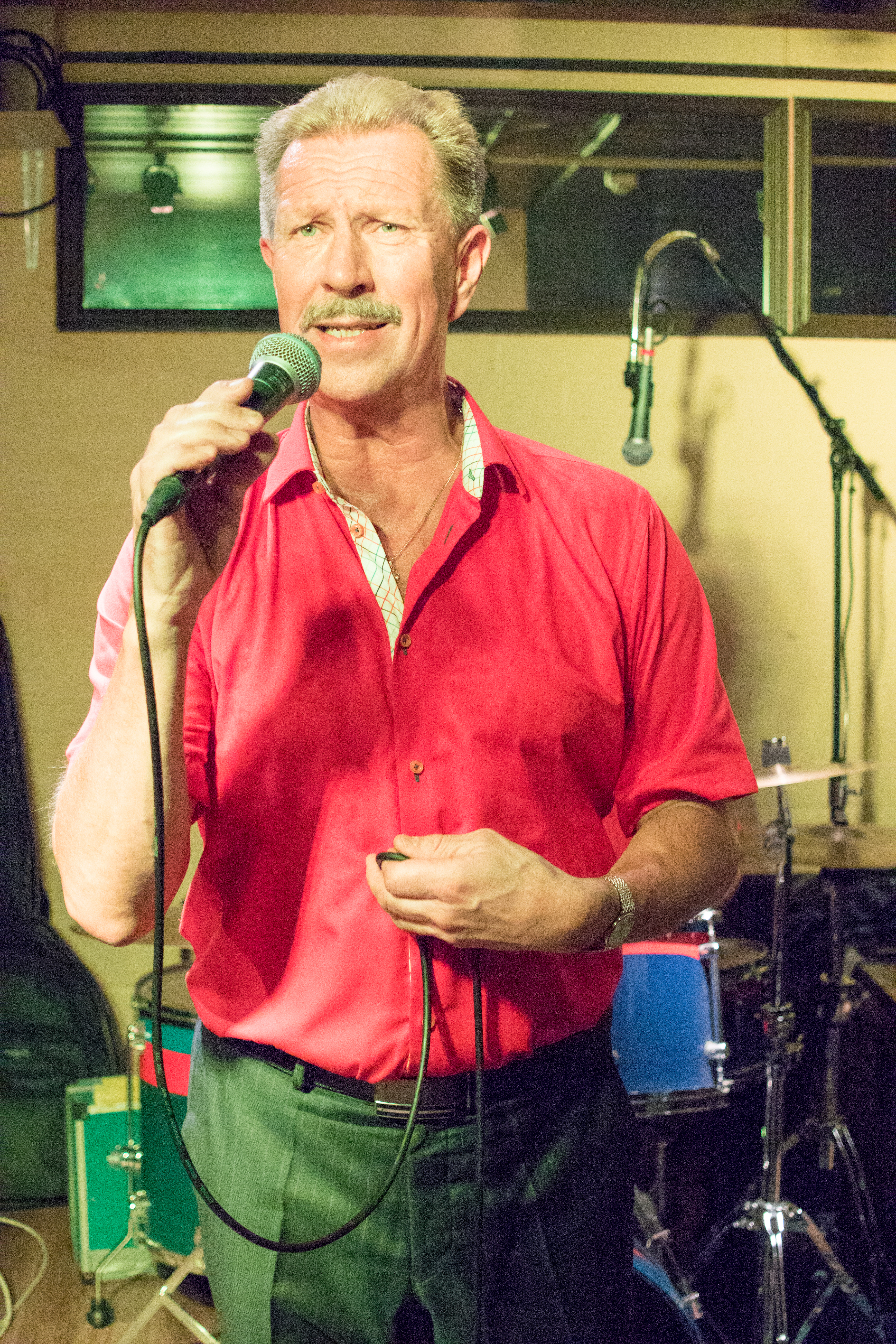 Lasse Hoikka suomalainen laulaja